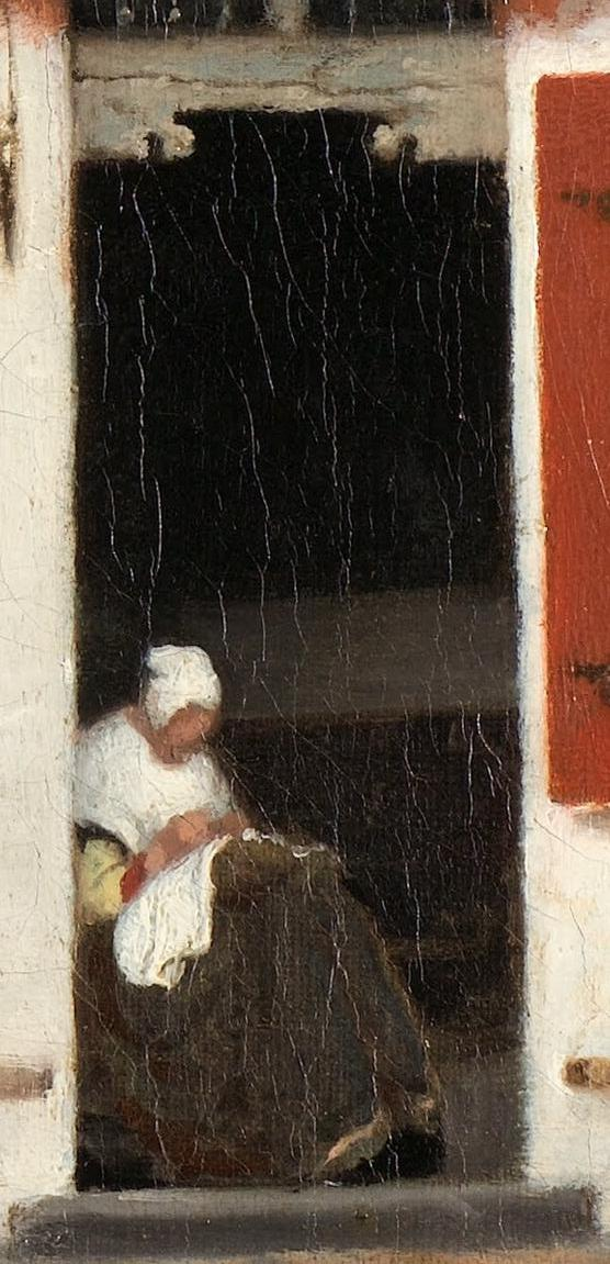 Vermeer La Ruelle detail femme cousant